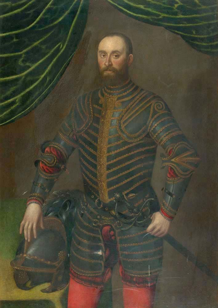 Ritratto di Carlo Gonzaga, Signore di Gazzuolo e San Martino